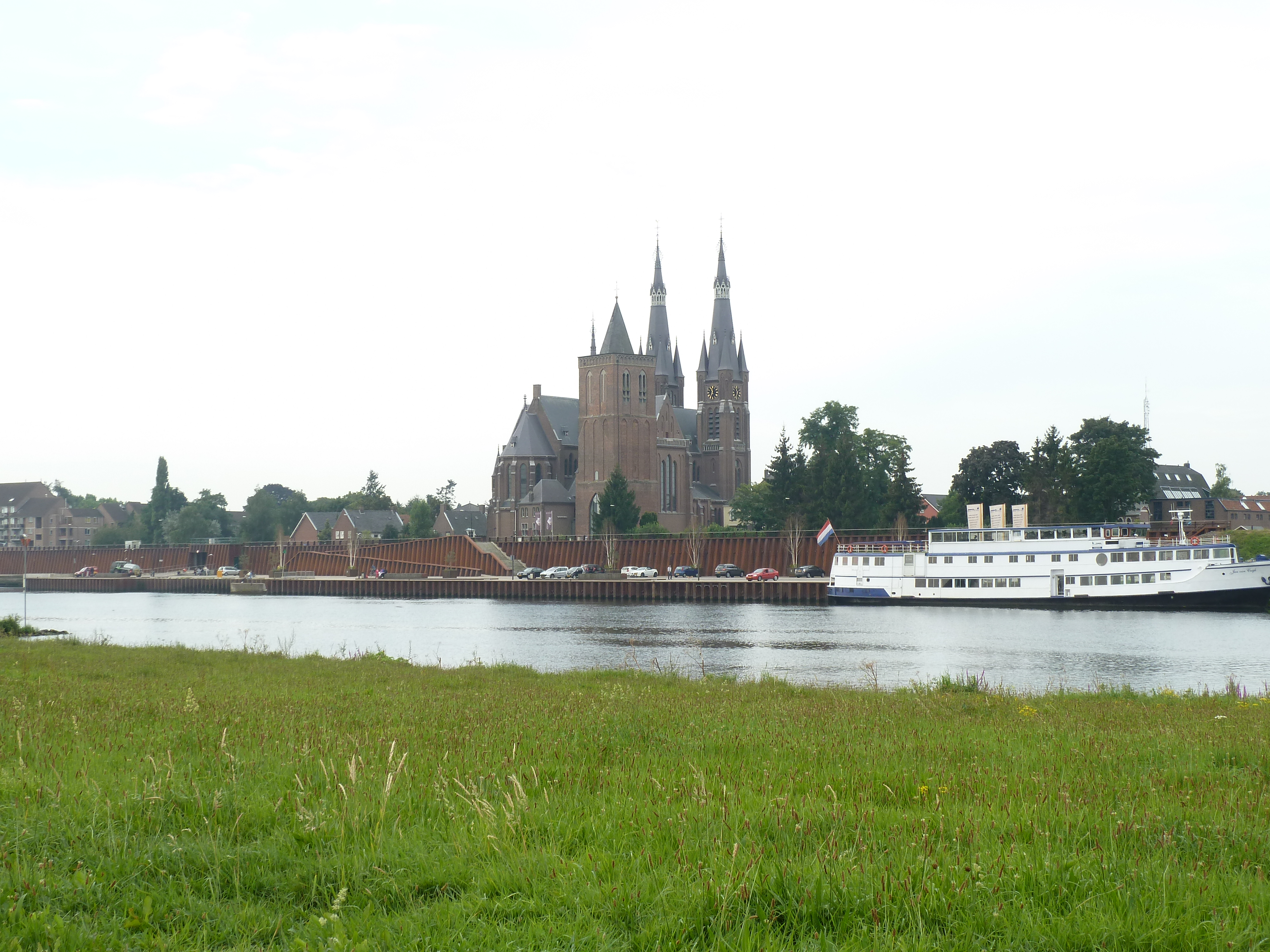 locatie Romeinse brug van Cuijk, Nederland